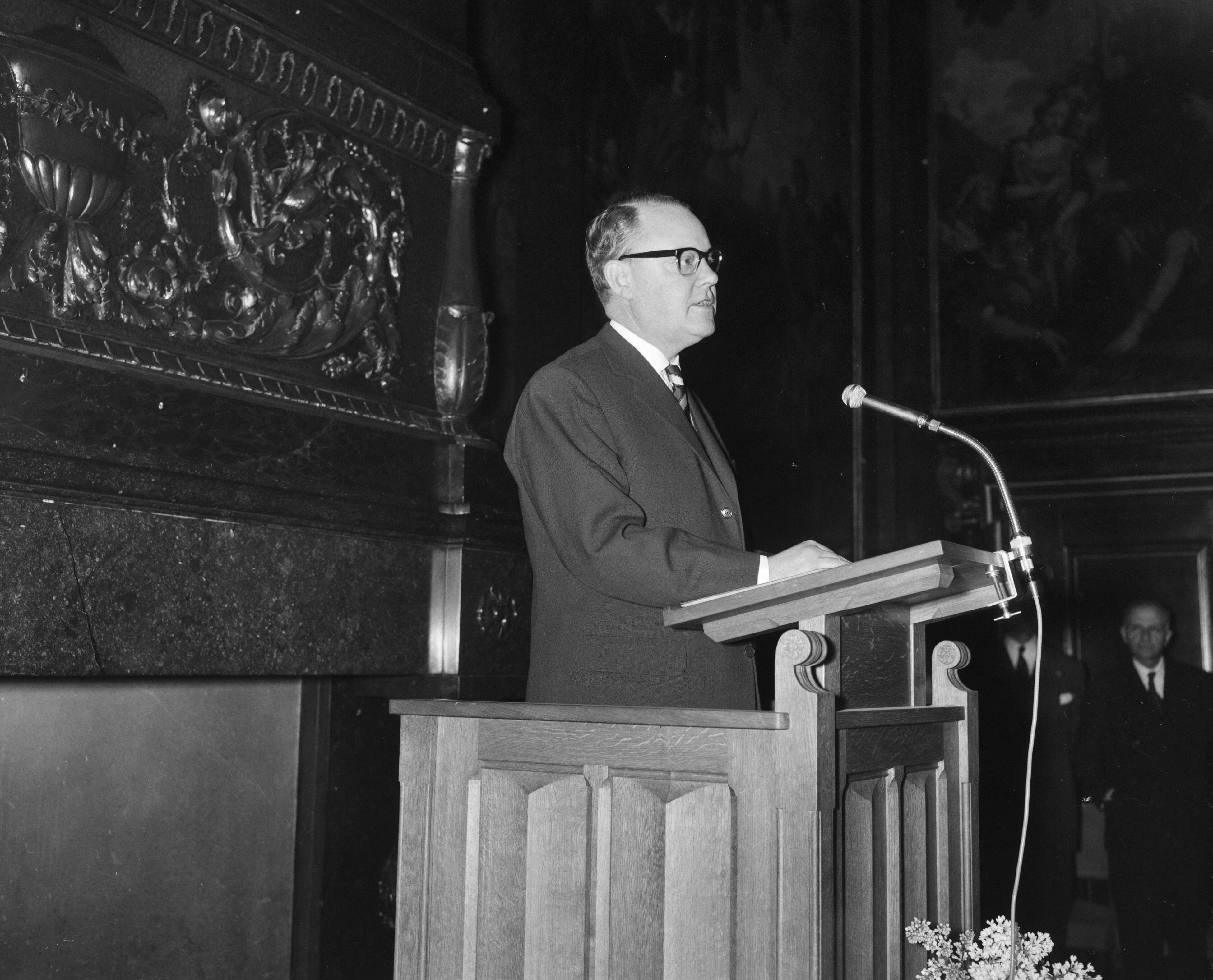 Collectie / Archief : Fotocollectie Anefo Reportage / Serie : [ onbekend ] Beschrijving : Opening Tentoonstelling "Berlijn bolwerk der vrijheid" door dr. J. Lons Datum : 1 maart 1961 Trefwoorden : Openingen Persoonsnaam : dr. J. Lons Fotograaf : Bilsen, Joop van / Anefo Auteursrechthebbende : Nationaal Archief Materiaalsoort : Negatief (zwart/wit) Nummer archiefinventaris : bekijk toegang 2.24.01.04 Bestanddeelnummer : 912-1591